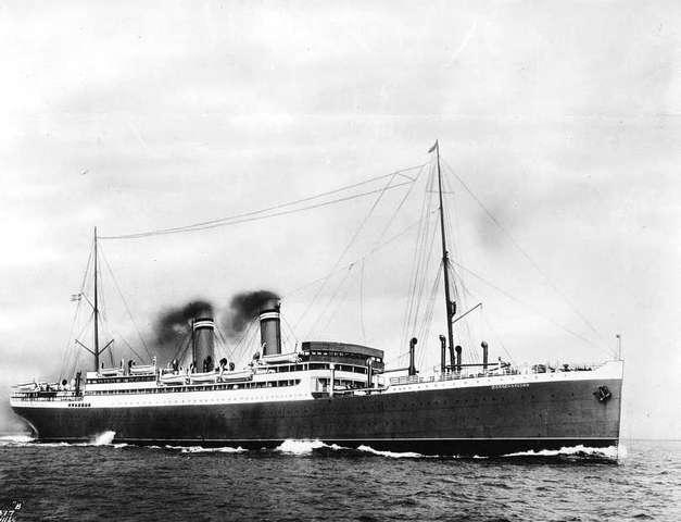 The Norwegian passenger ship Bergensfjord.